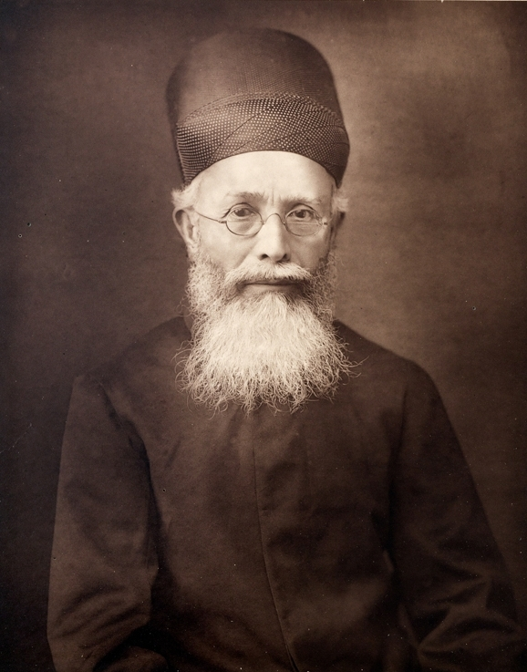 Dadabhai Naoroji, (Woodburytype)